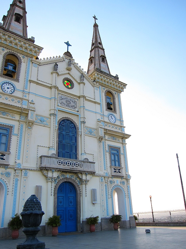 Igreja da Penha.